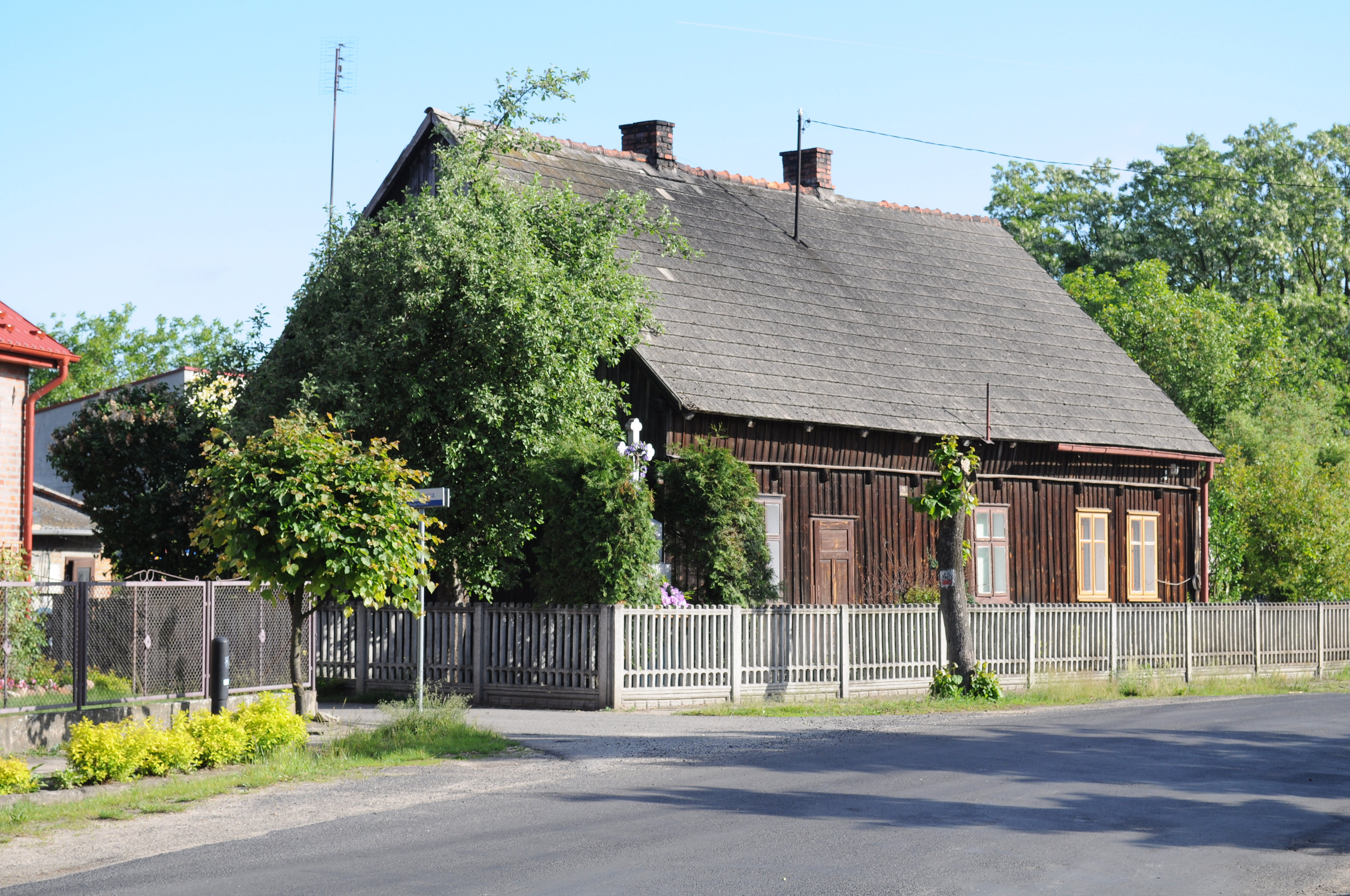 Stary dom w Węglowicach.